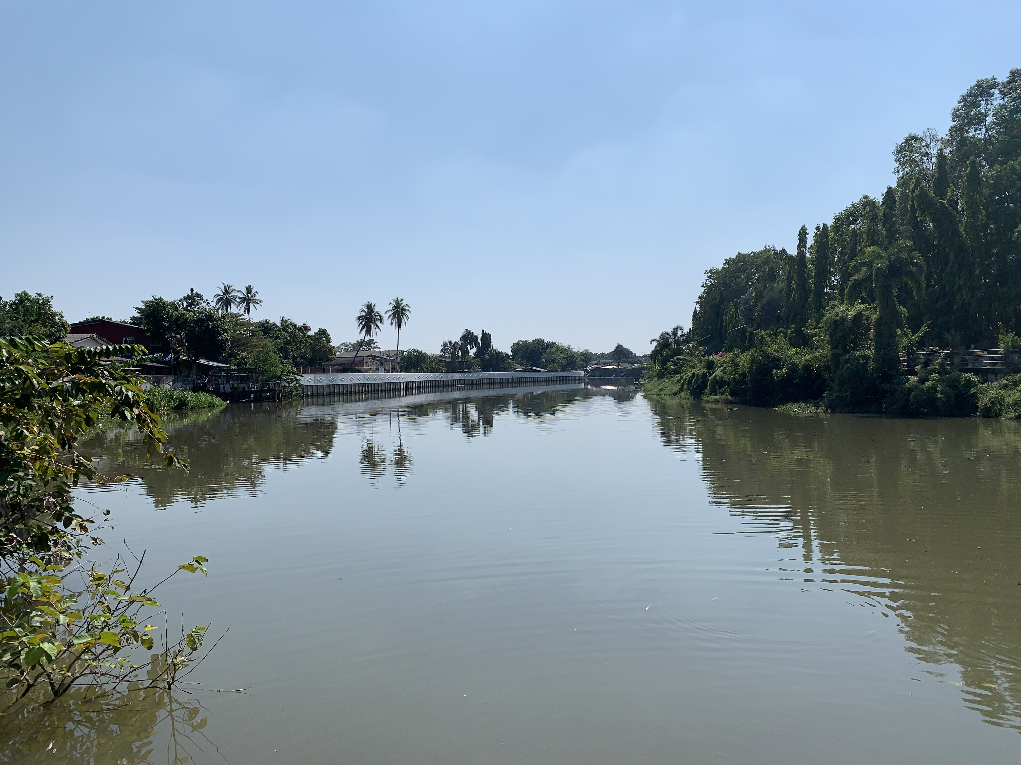 วัดโพธินายก จังหวัดนครนายก